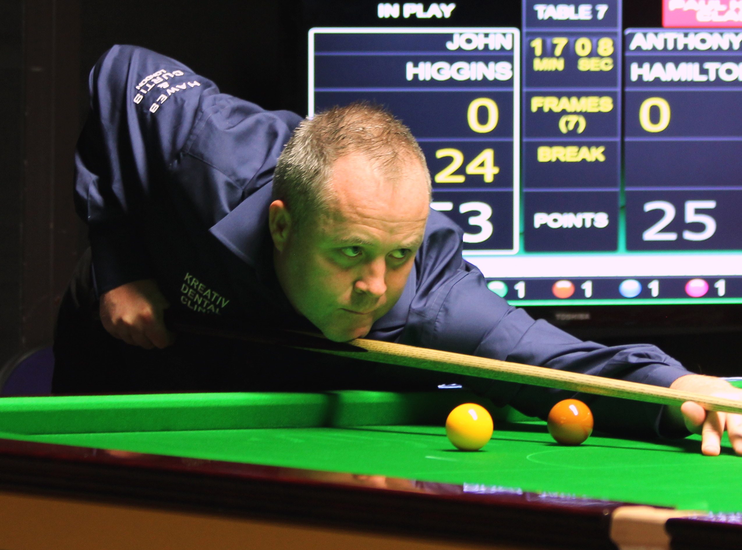 John Higgins beim Paul Hunter Classic 2015